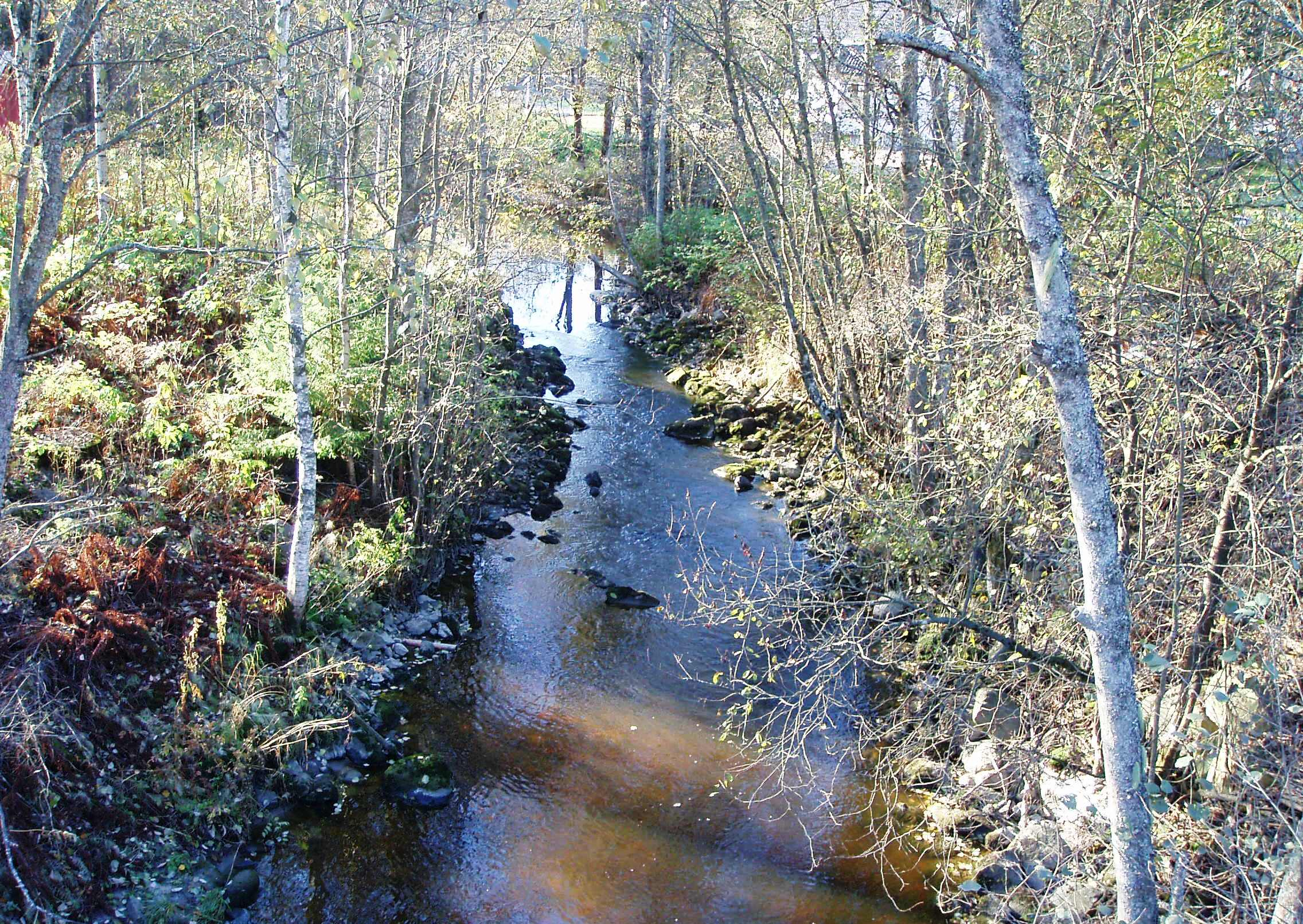 Vestelva i Aurskog-Høland kommune.